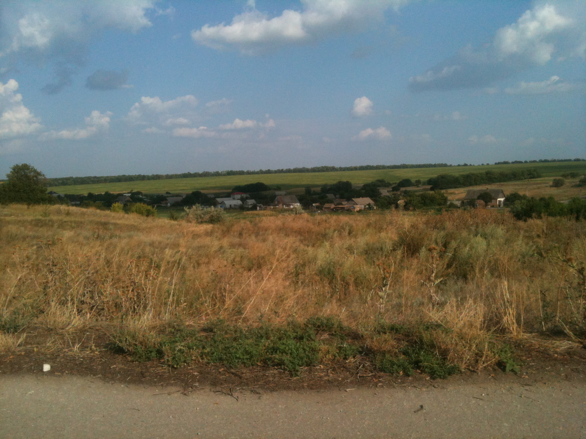 Село Долинське (Запорізький район), 2013 рік